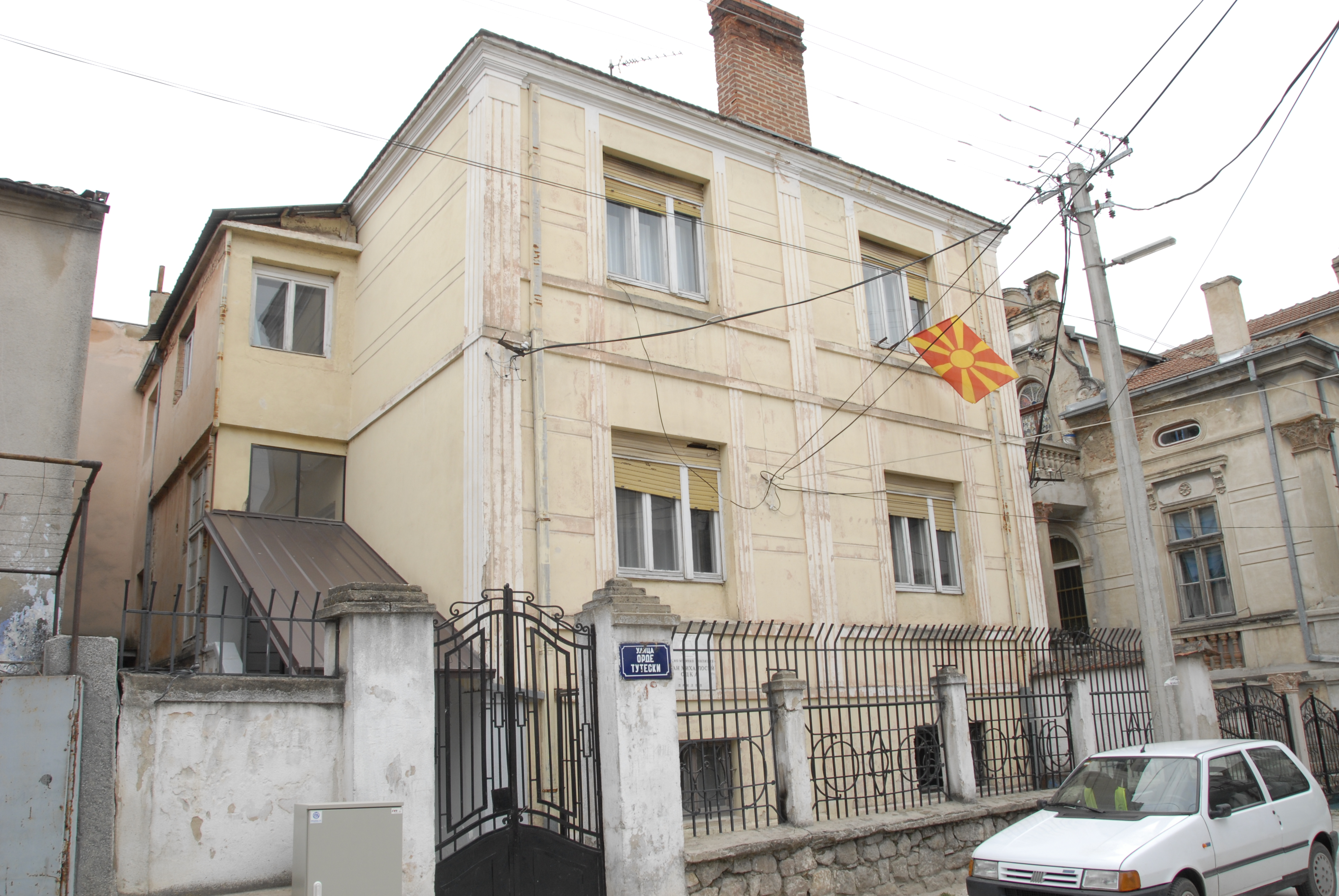 Музичкото училиште "Ордан Михајлоски Оцка" е основано на 08.09.1949 година во Прилеп со записник бр. 35 од градскиот народен одбор, а верифицирано е со решение бр. 09-386/1 од 17.03.1986 година од страна на Министерството за образование и наука.